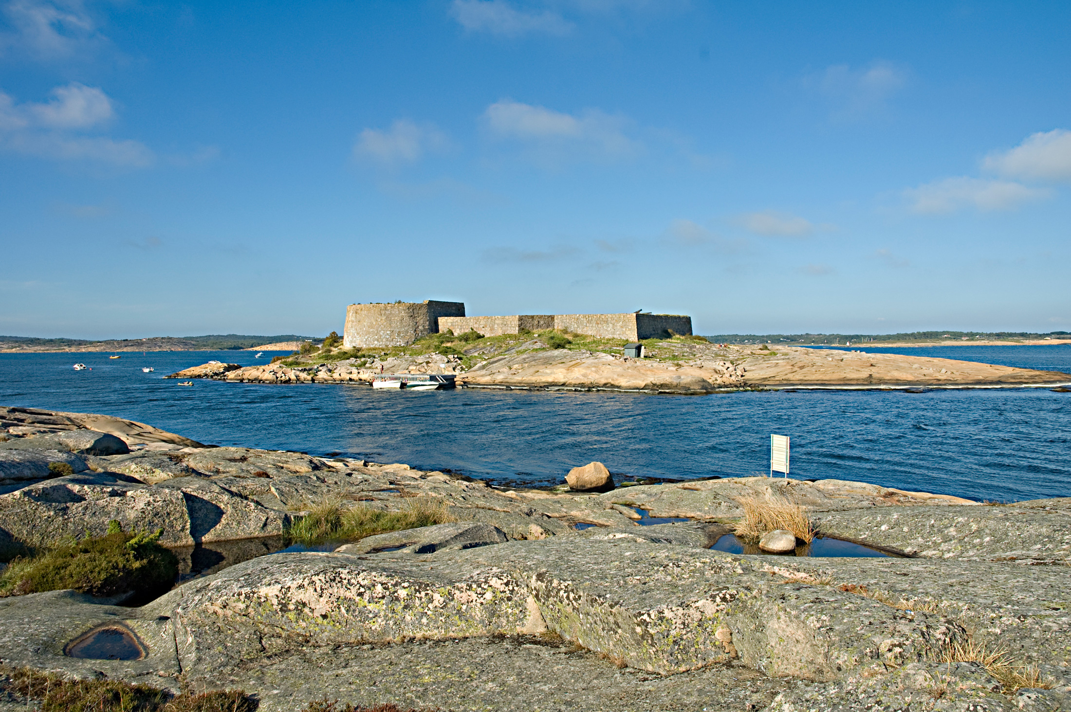 Festningsholmen